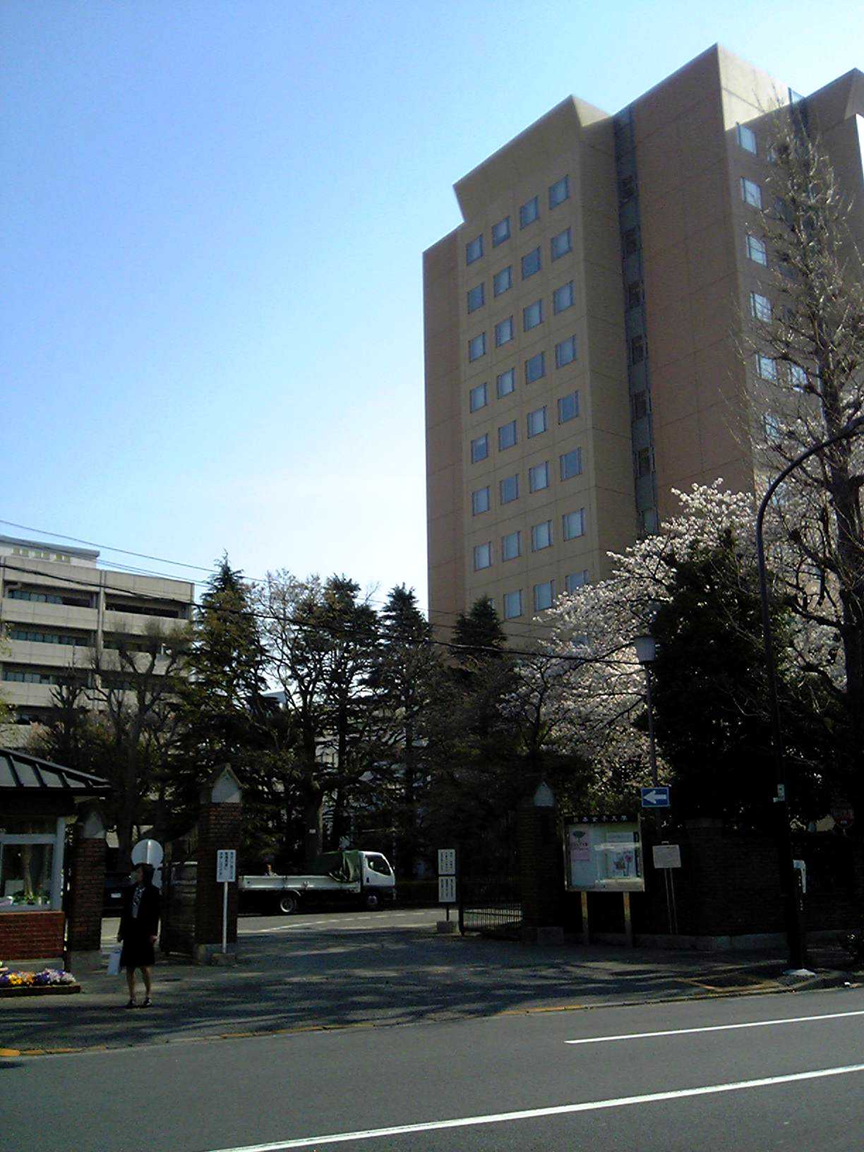 日本女子大学（2006年4月4日投稿者が撮影）